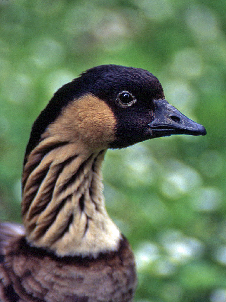 Branta sandvicensis (Vigors, 1834).